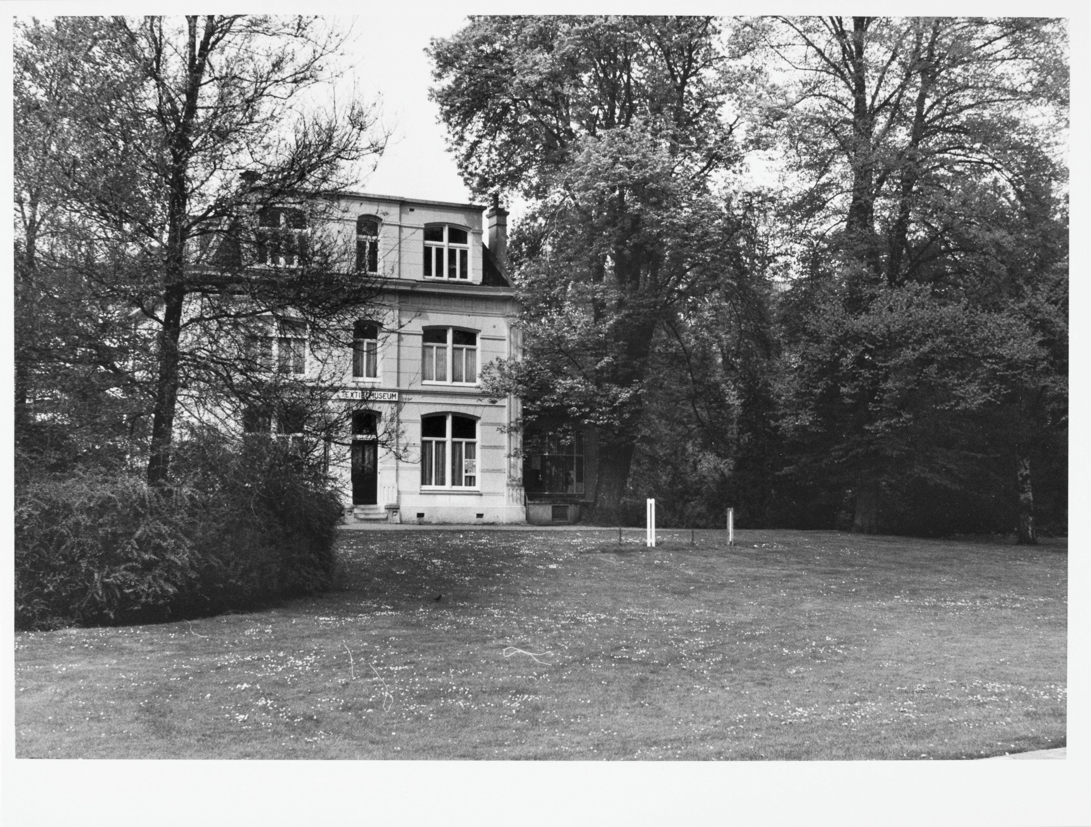 Enschede Villa Blijdenstein: Voorgevel tussen de bomen door gezien. Villa de Bank